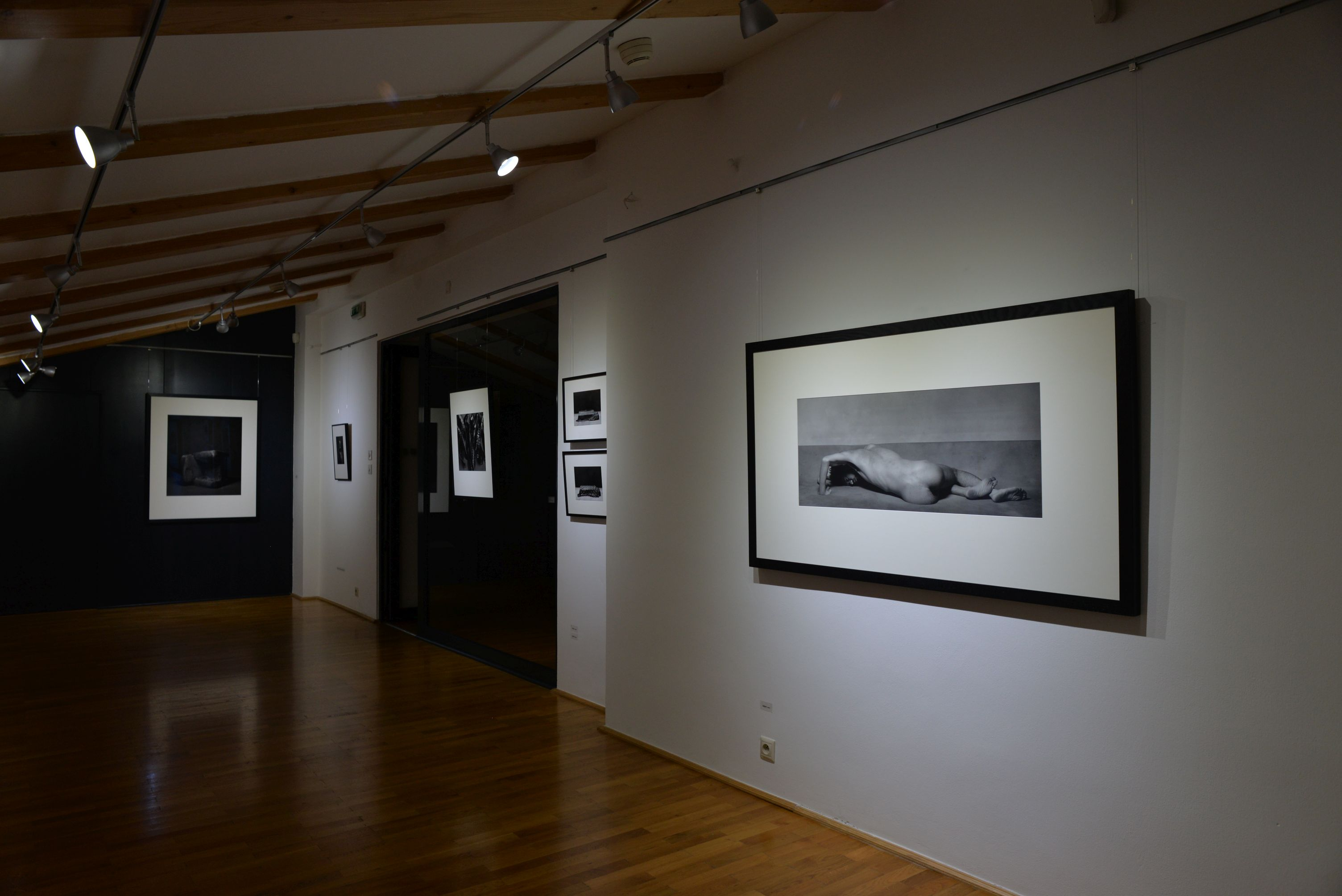 Výstava fotografií Ivana Pinkavy v Lašském muzeu (podzim 2018)